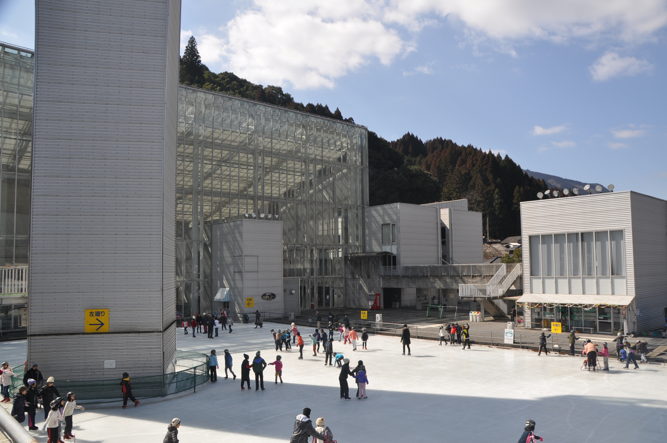 冬の時期は市内外問わず多くの人で賑わっています。